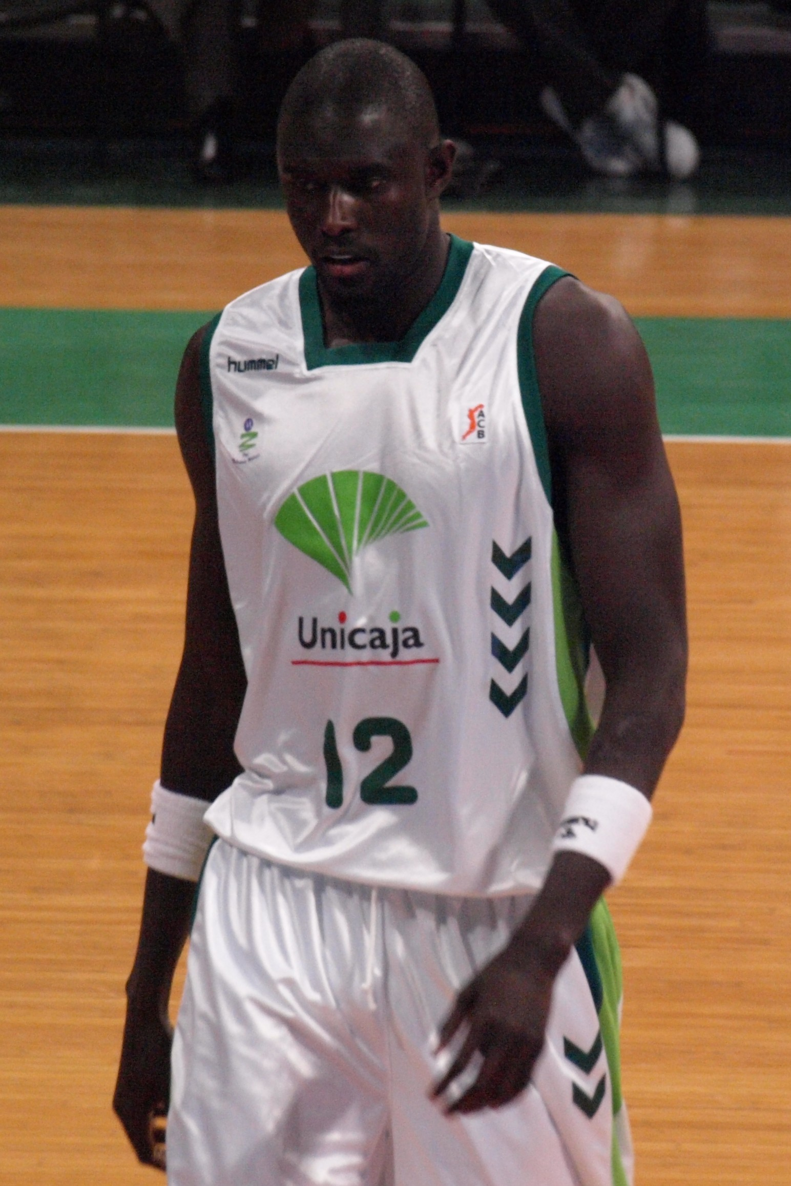 Boniface N´Dong en el partido que enfrentó al al Unicaja Málaga y al DKV Joventut de liga ACB en el Olímpico de Badalona en febrero de 2009